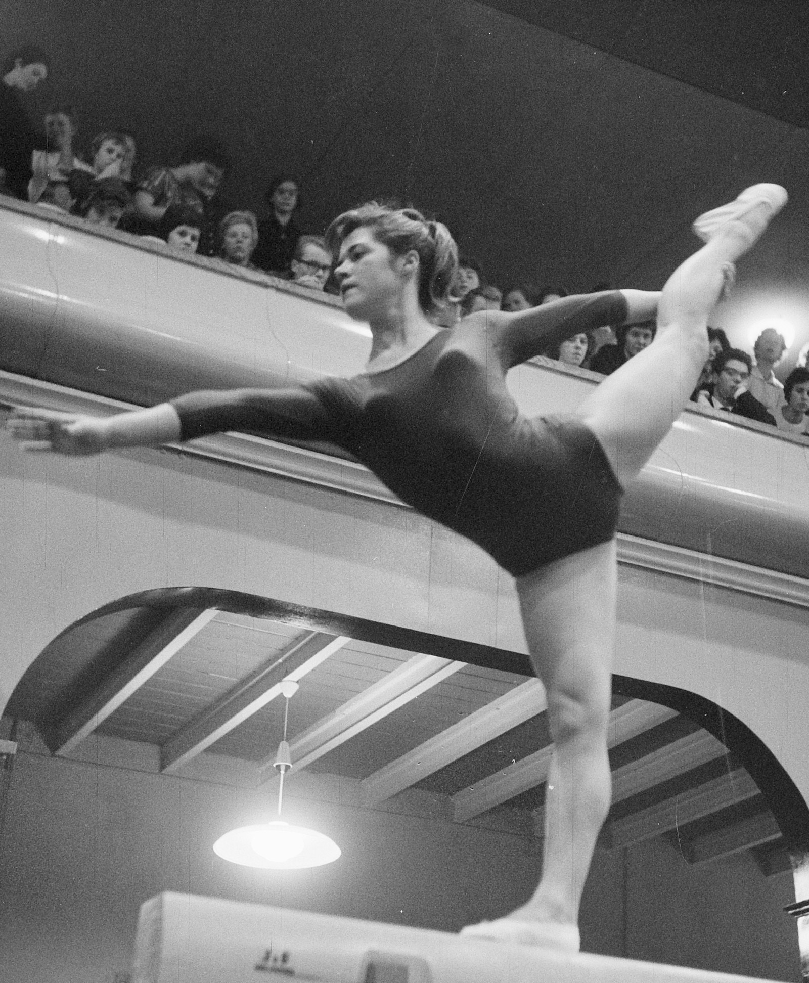 Halve finales turnenkampioenschappen van Nederland. Nel Fritz in actie